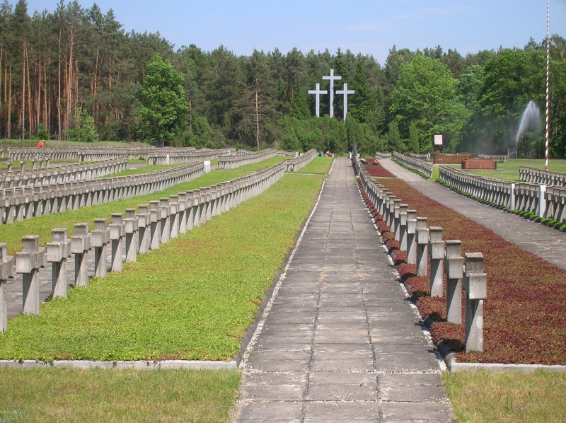 Palmiry